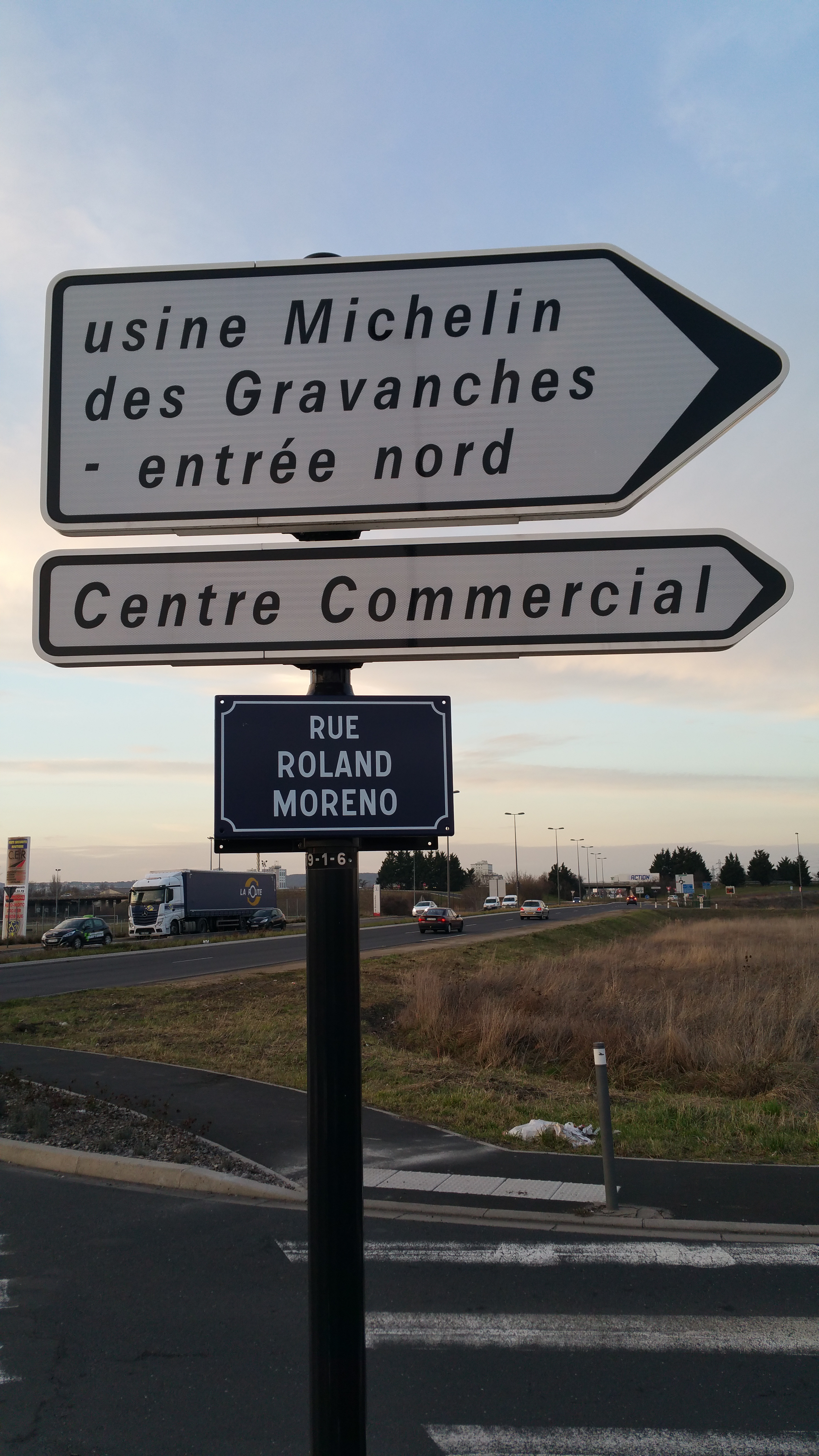 Plaque de la rue Roland-Moreno dans la zone d'activités du Brezet à Clermont-Ferrand.